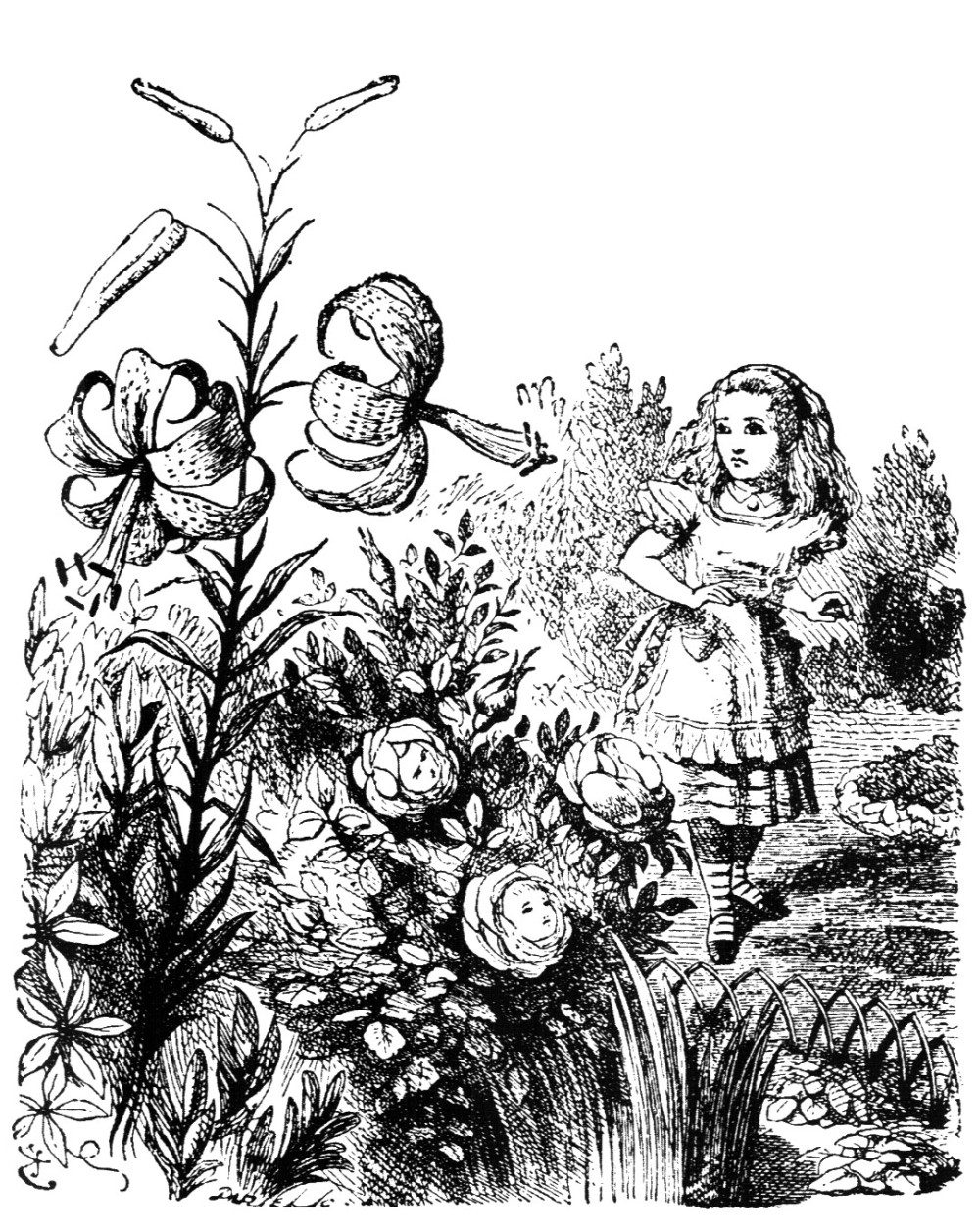 гравюра Джона Тенниела